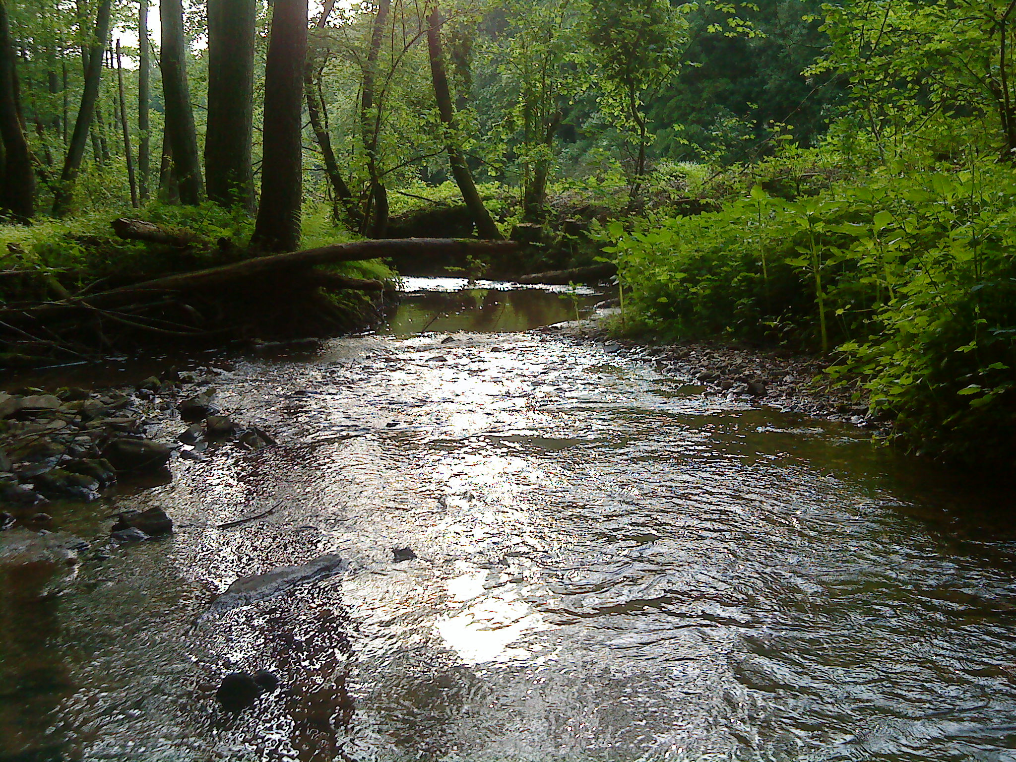 Der Geiselbach im Teufelsgrund zwischen Mömbris und Geiselbach